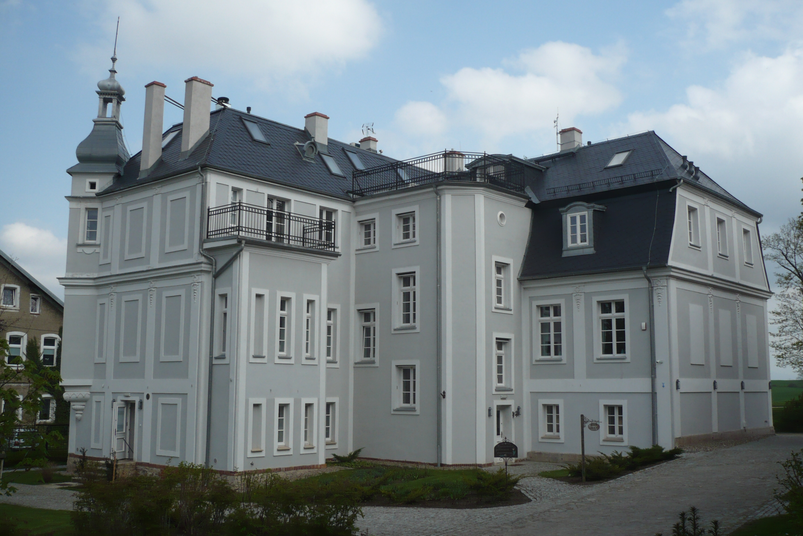 Kamieniec. Pałac